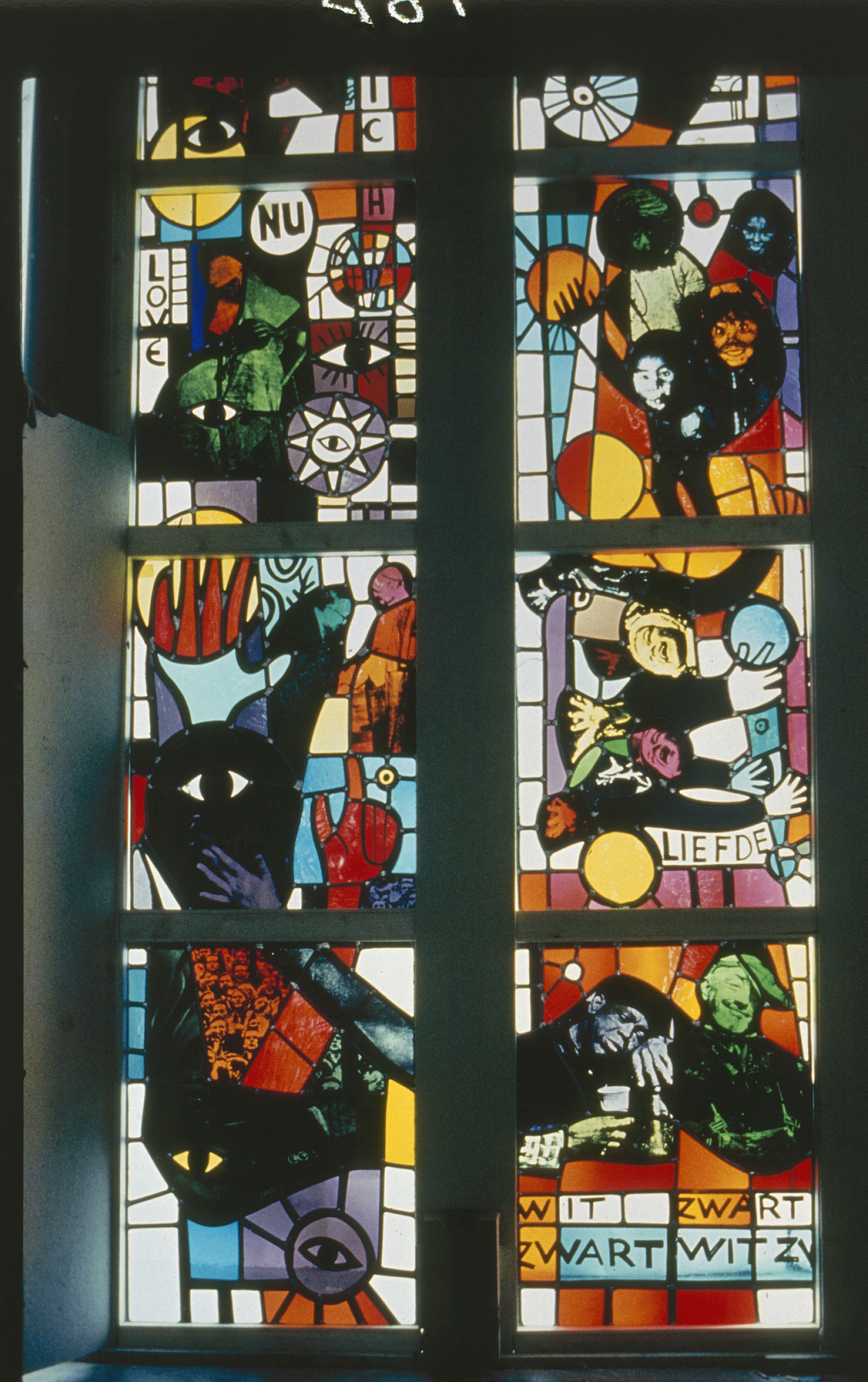 Sint Martinuskerk: Interieur, aanzicht pop-artraam, silkscreenprocédé glas-in-loodraam (opmerking: Gefotografeerd voor Glas in lood in Nederland 1817-1968)